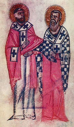 Երևան, ձեռ. 1502, էջ 64բ, Հայսմավուրք, 1651 թ., Կ. Պոլիս